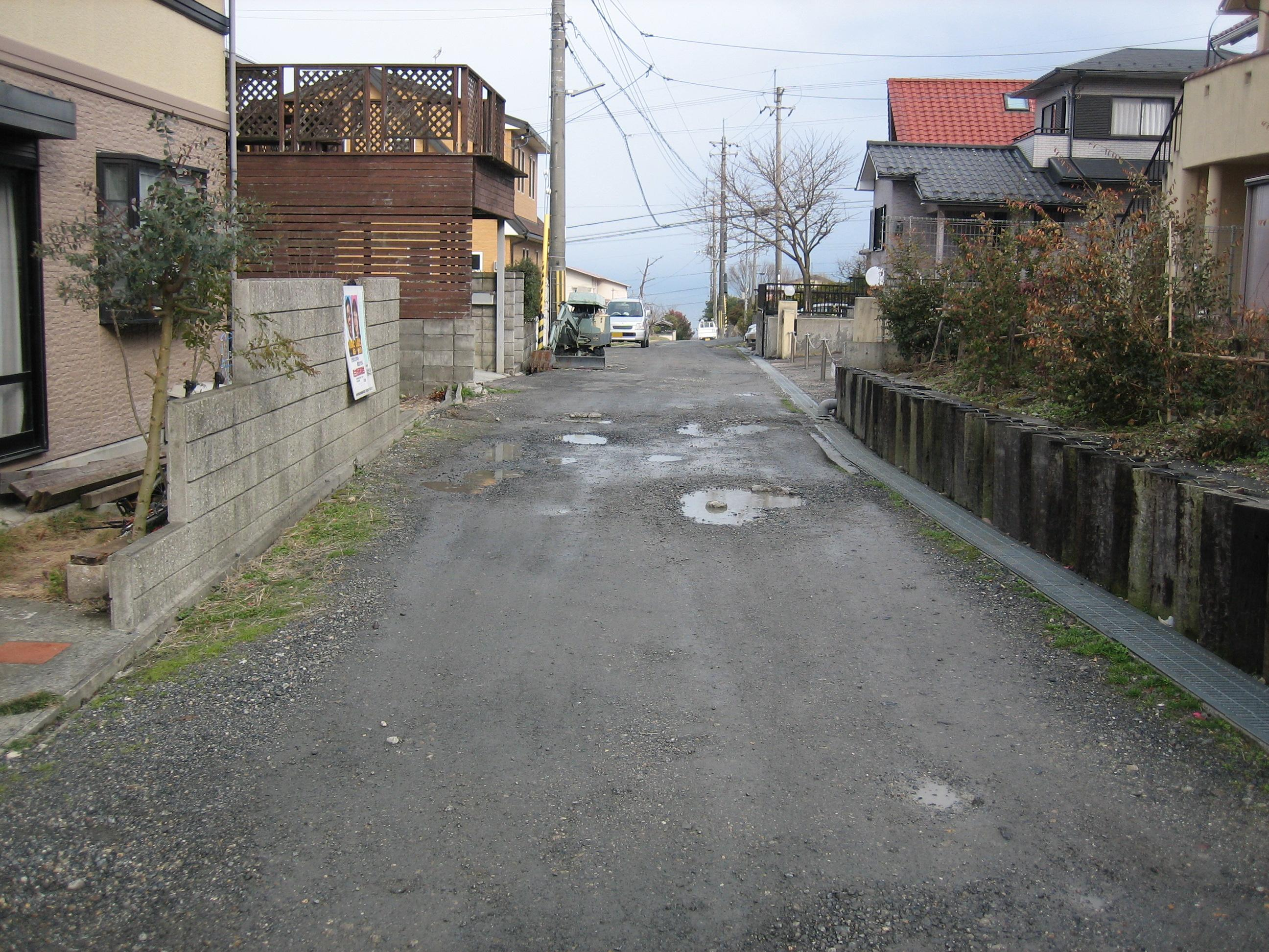 滋賀県大津市和邇北浜から住吉台地区内を撮影